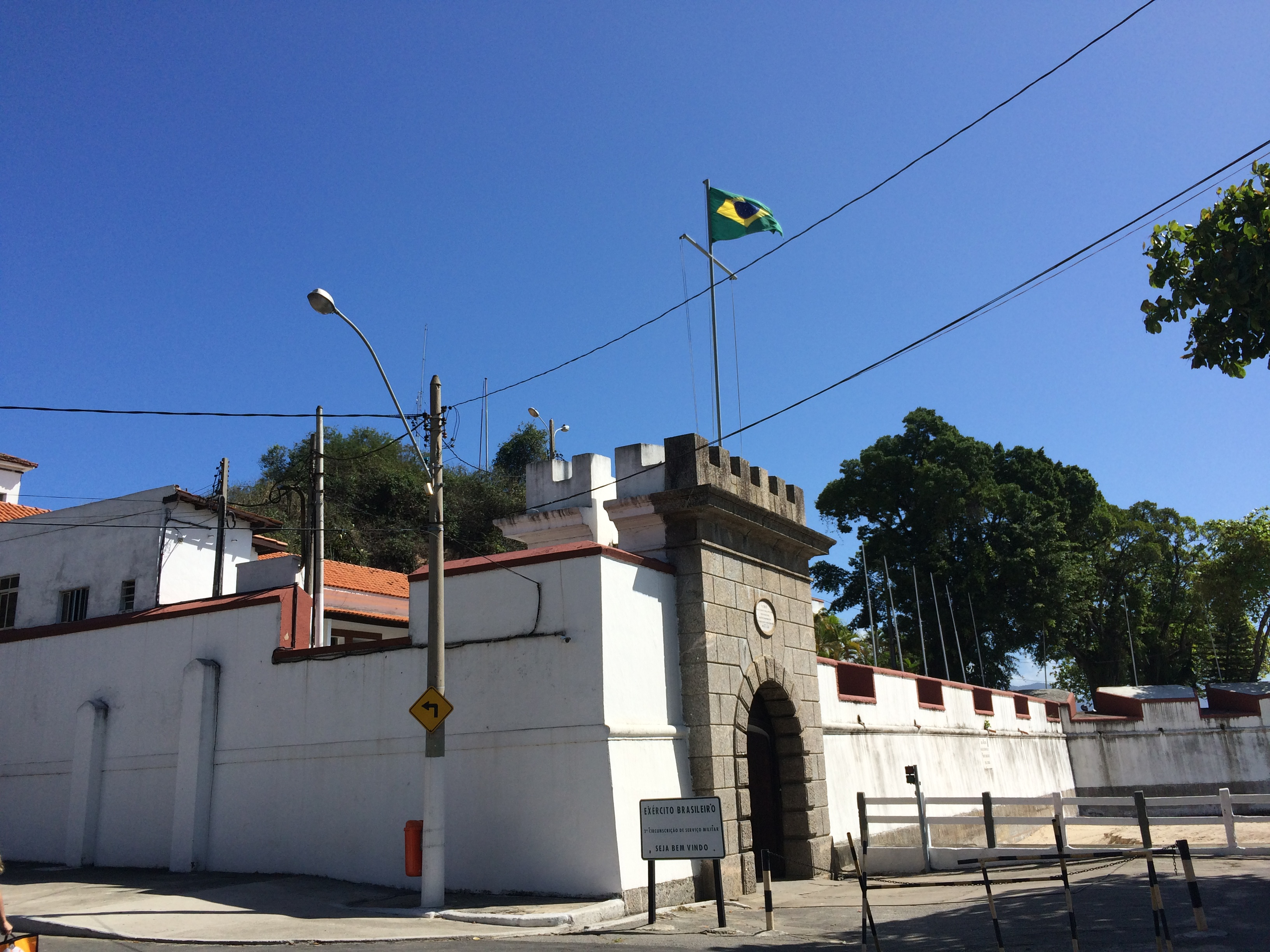 Forte de Gragoatá